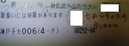 台風による運休の払い戻しの際、JR他社クレジットカードでの記入のため、発行元会社に対する払い戻し要請のコメント。